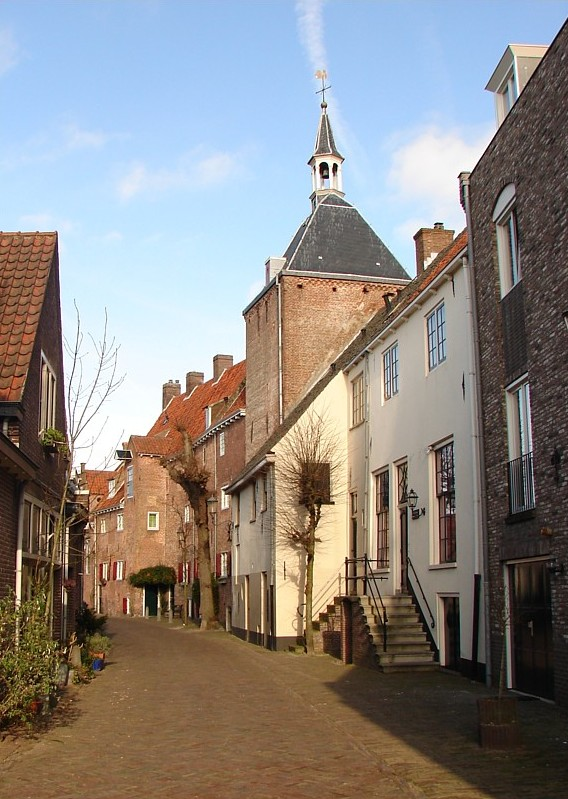 de Plompetoren in Amersfoort. Onderdeel van de eerste stadsmuur.